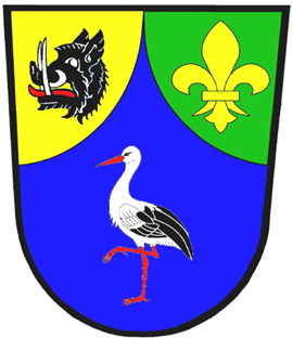 znak obce Hajany